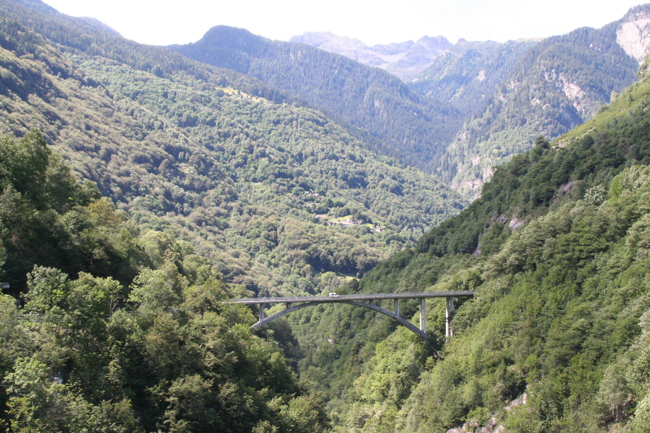 Brücke eingangsde:Calancatal